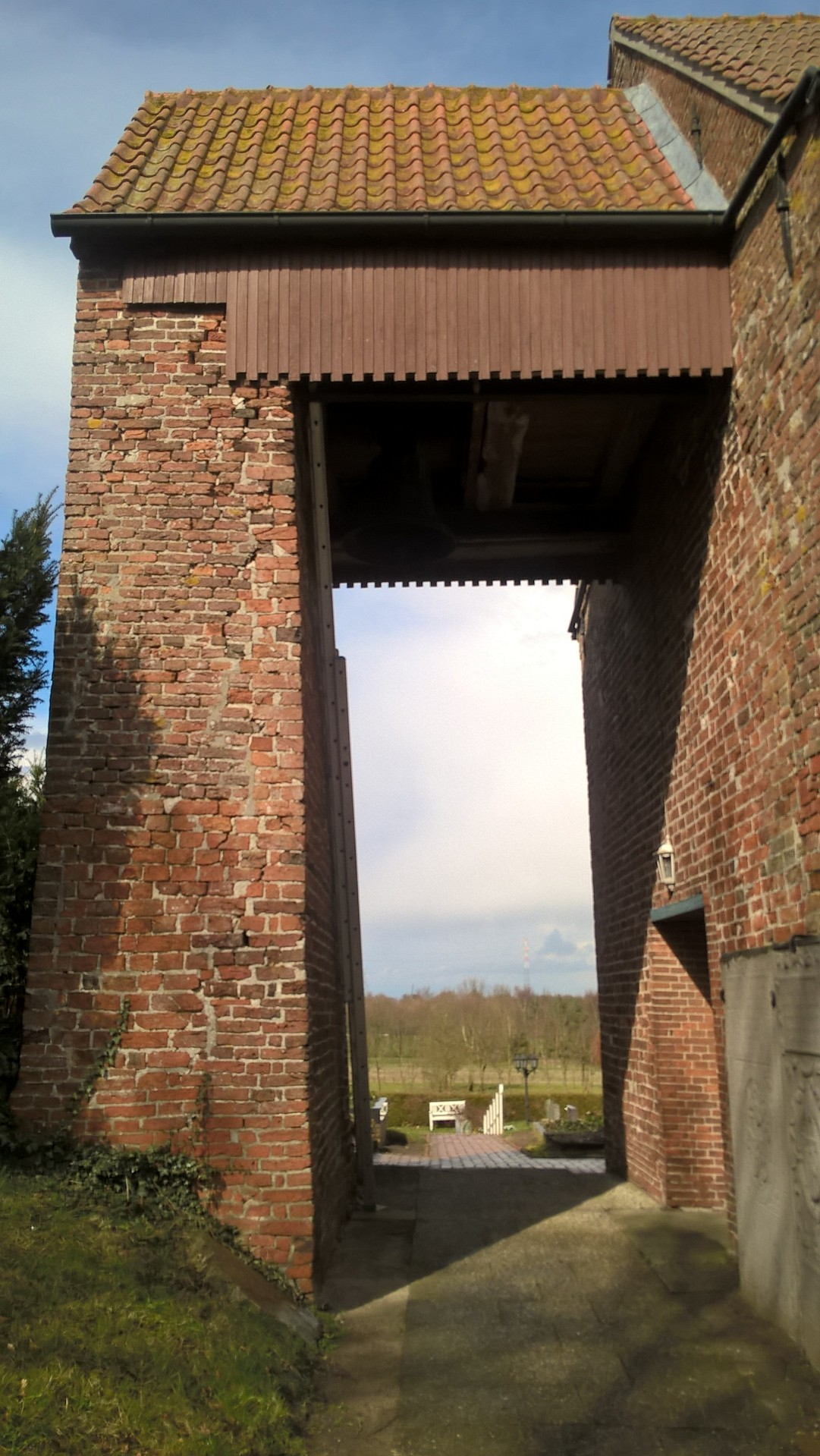 Evangelisch-reformierte Kirche Mitling-Mark, Gemeinde Westoverledingen, Landkreis Leer, Ostfriesland, Niedersachsen, Deutschland